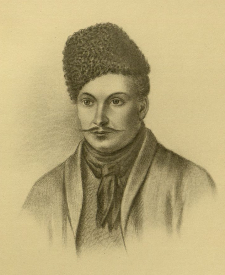 Головачев, П. М. Декабристы : 86 портретов, вид Петровского завода и 2 бытовых рисунка того времени. - М., [1906] Давыдов, Василий Львович